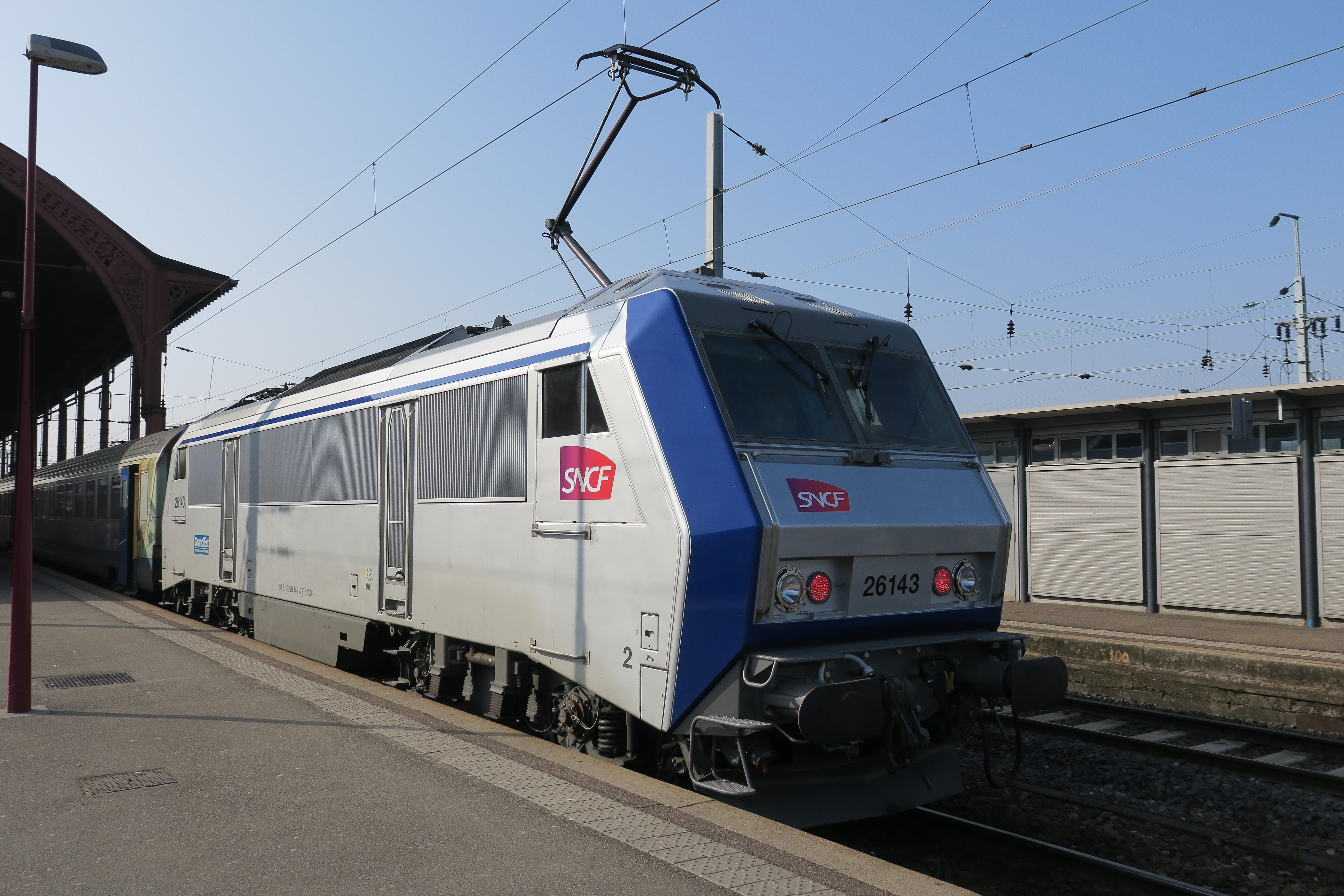 La nouvelle livrée après OPMV des BB 26143 R & 26148 R TER Grand Est.